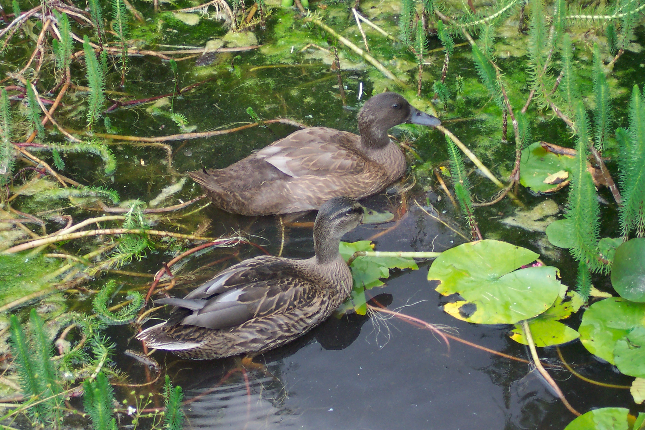 An 8 week Khaki Campbell duck (rear) and 13 week Mallard